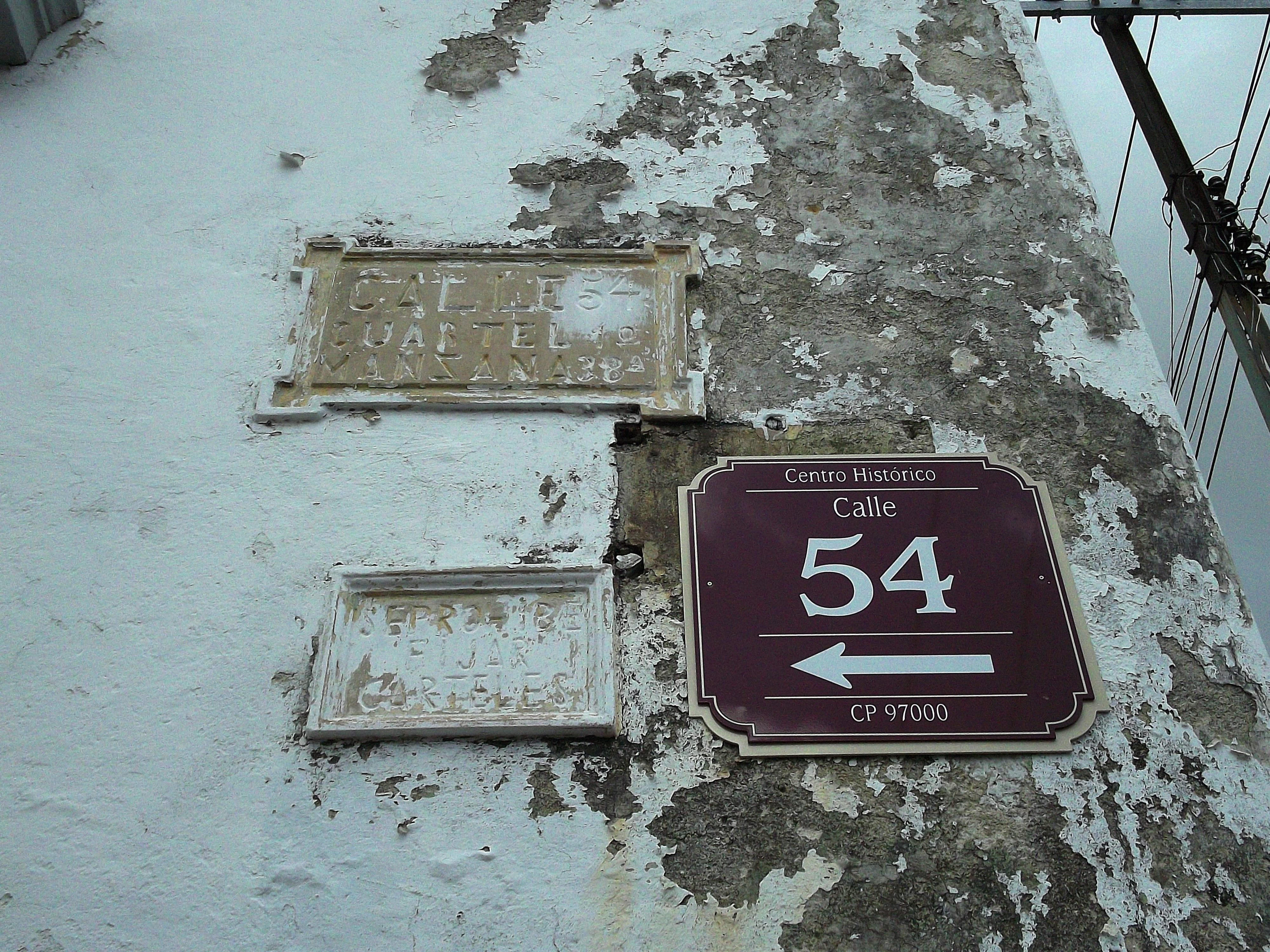 Piedra grabada que señala el Cuartel 1º de la ciudad de Mérida, Yucatán.